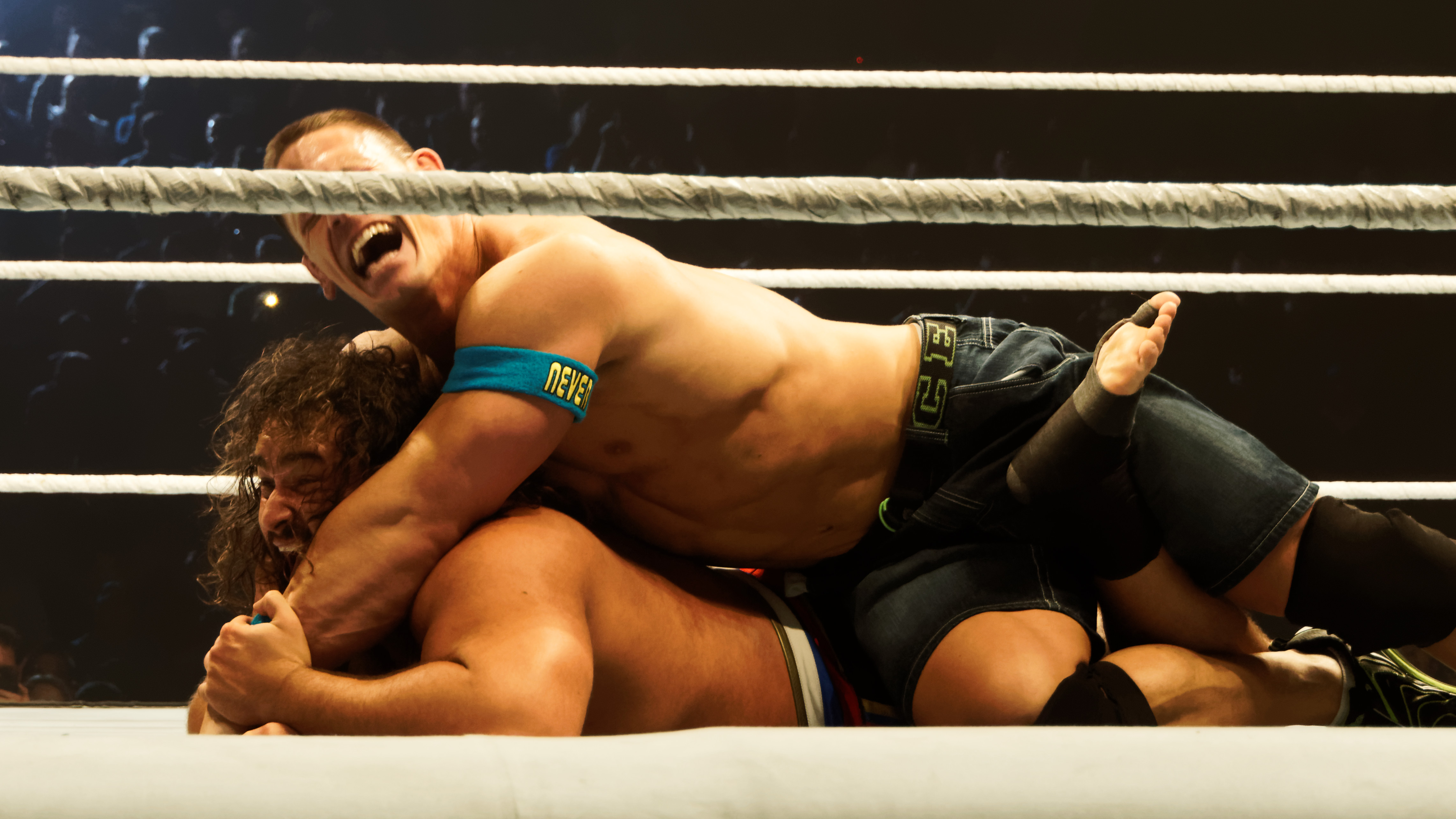 WWE Live@Lotto Arena - Antwerpen